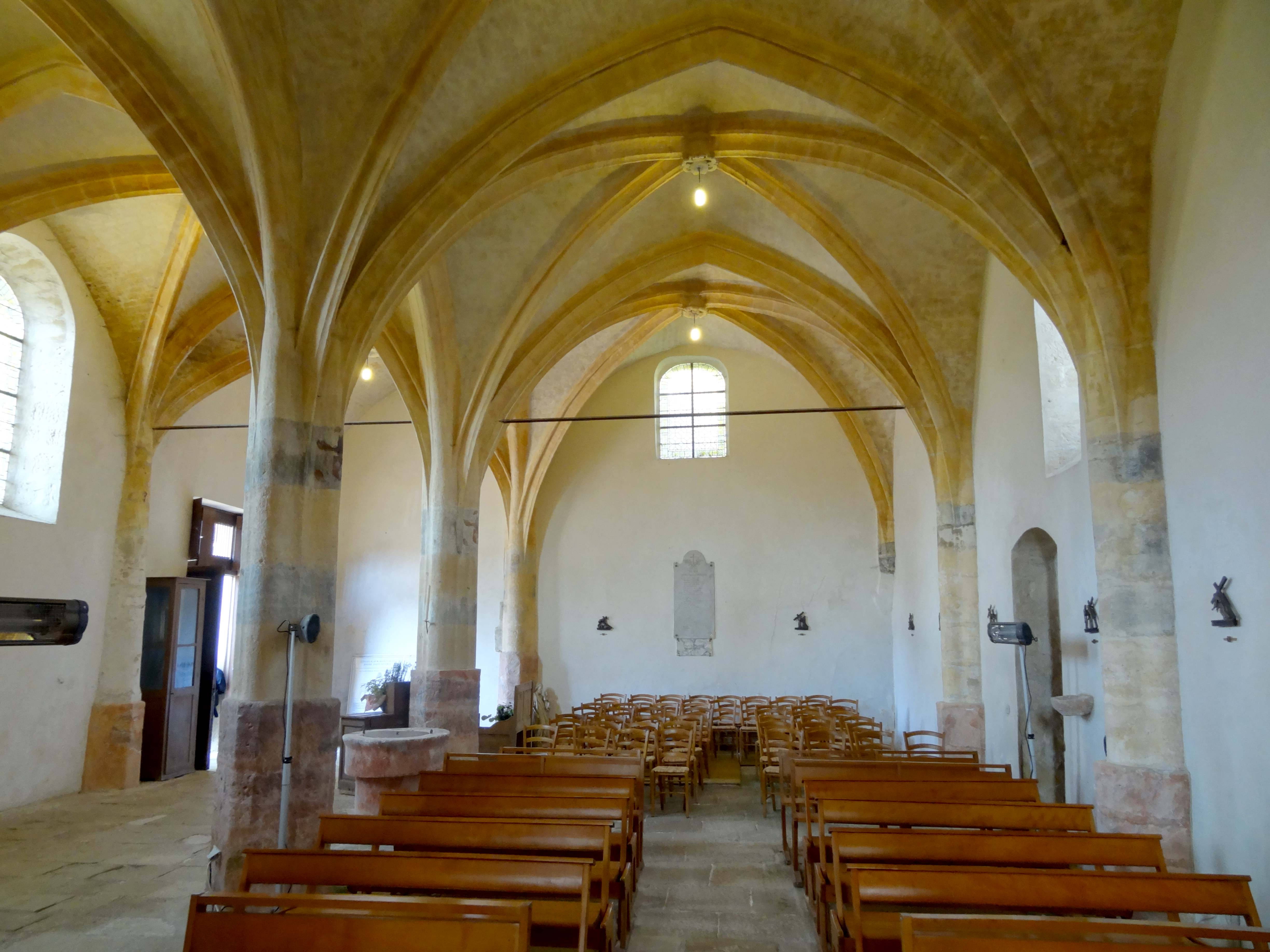 Intérieur de l'église - voir titre.